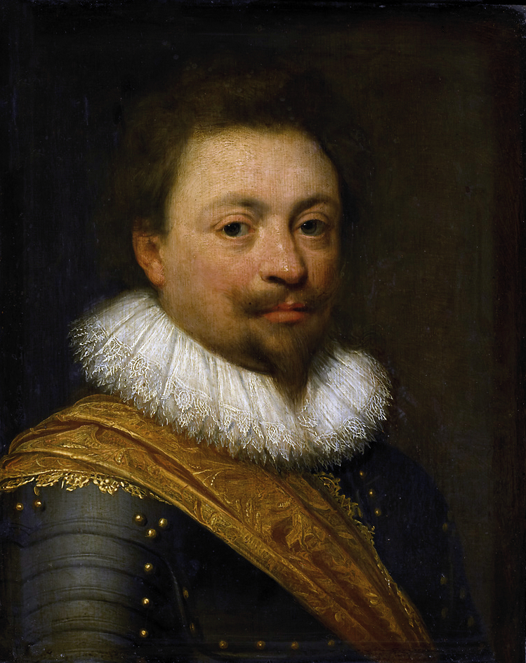 Part of the Katzenelnbogen Series